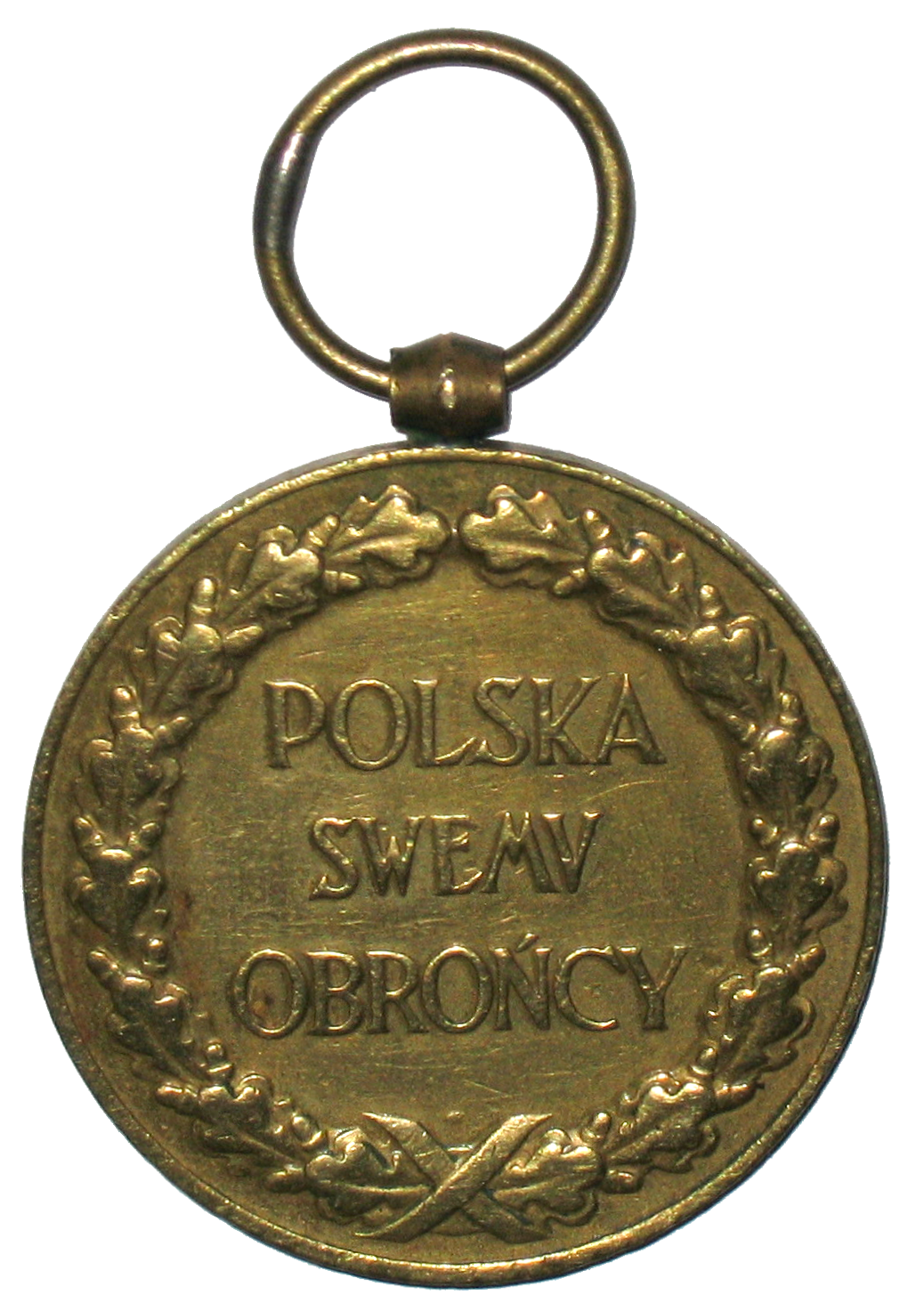 Medal PSO za wojnę 1918-1921 rewers